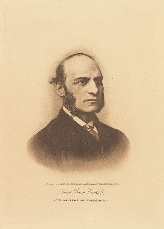 Farrer Herschell, 1st Baron Herschell (1837-1899)